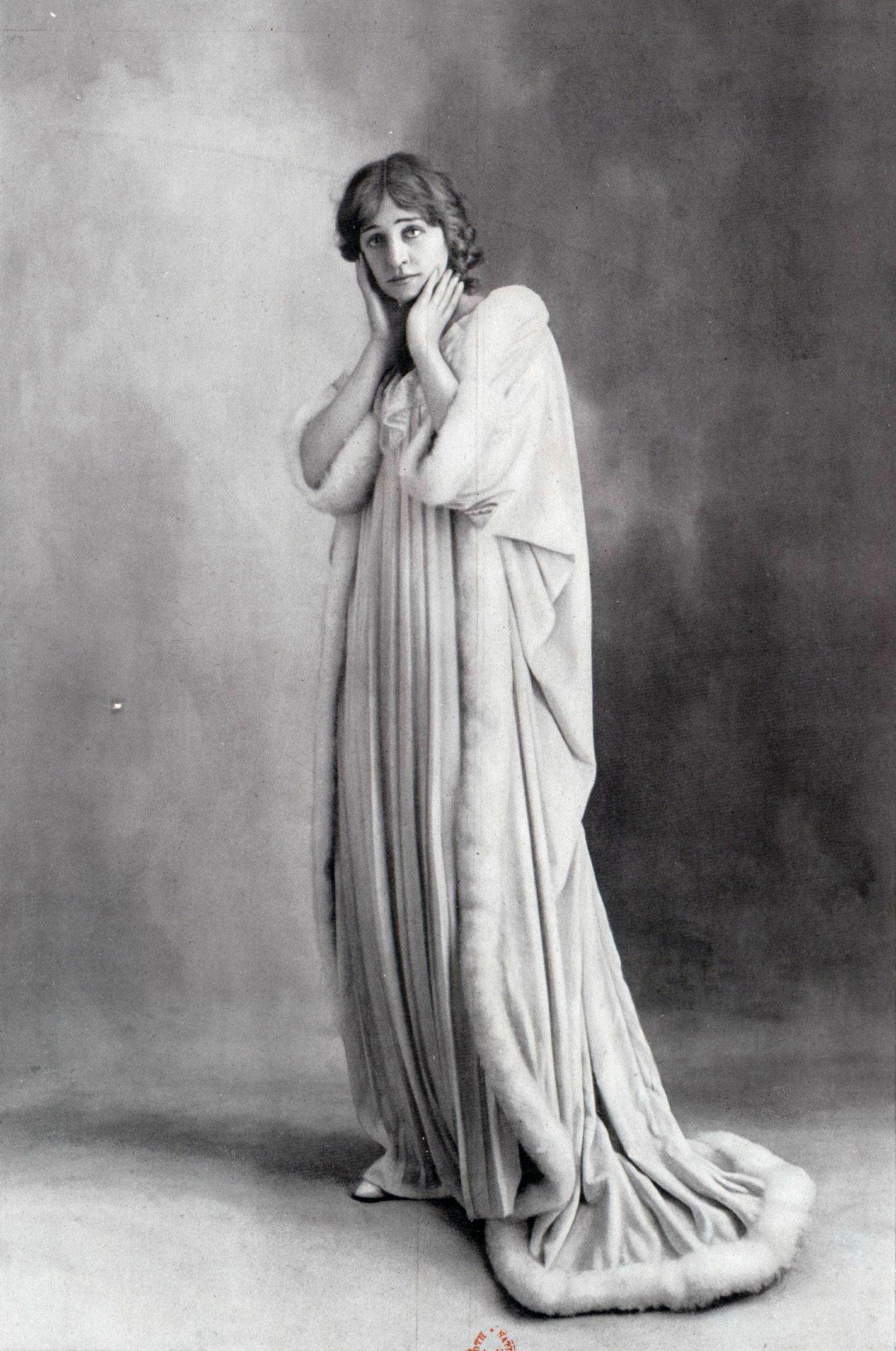 Mlle Geneviève Vix (1879-1939), de l'Opéra-Comique, dans La Traviata : Déshabillé de Redfern. "Chemise plissée en voile blanc. Manteau de velours souplement drapé et bordé de cygne". Photograph in Les Modes : Revue mensuelle illustrée des arts décoratifs appliqués à la femme.